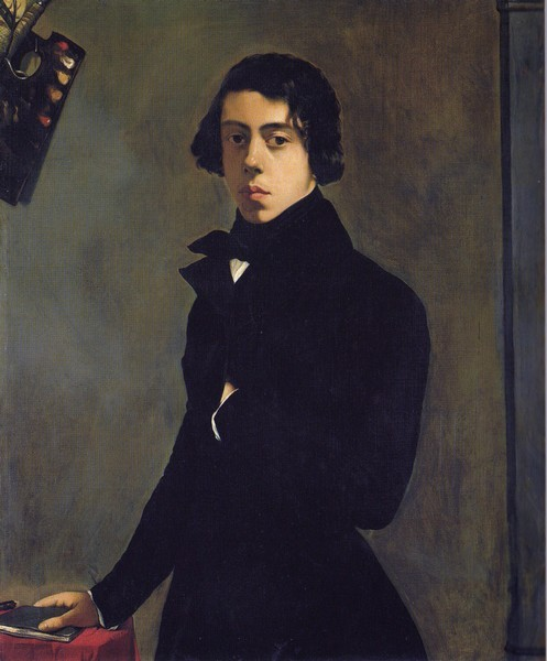 Autoportrait de Chassériau à 16 ans.